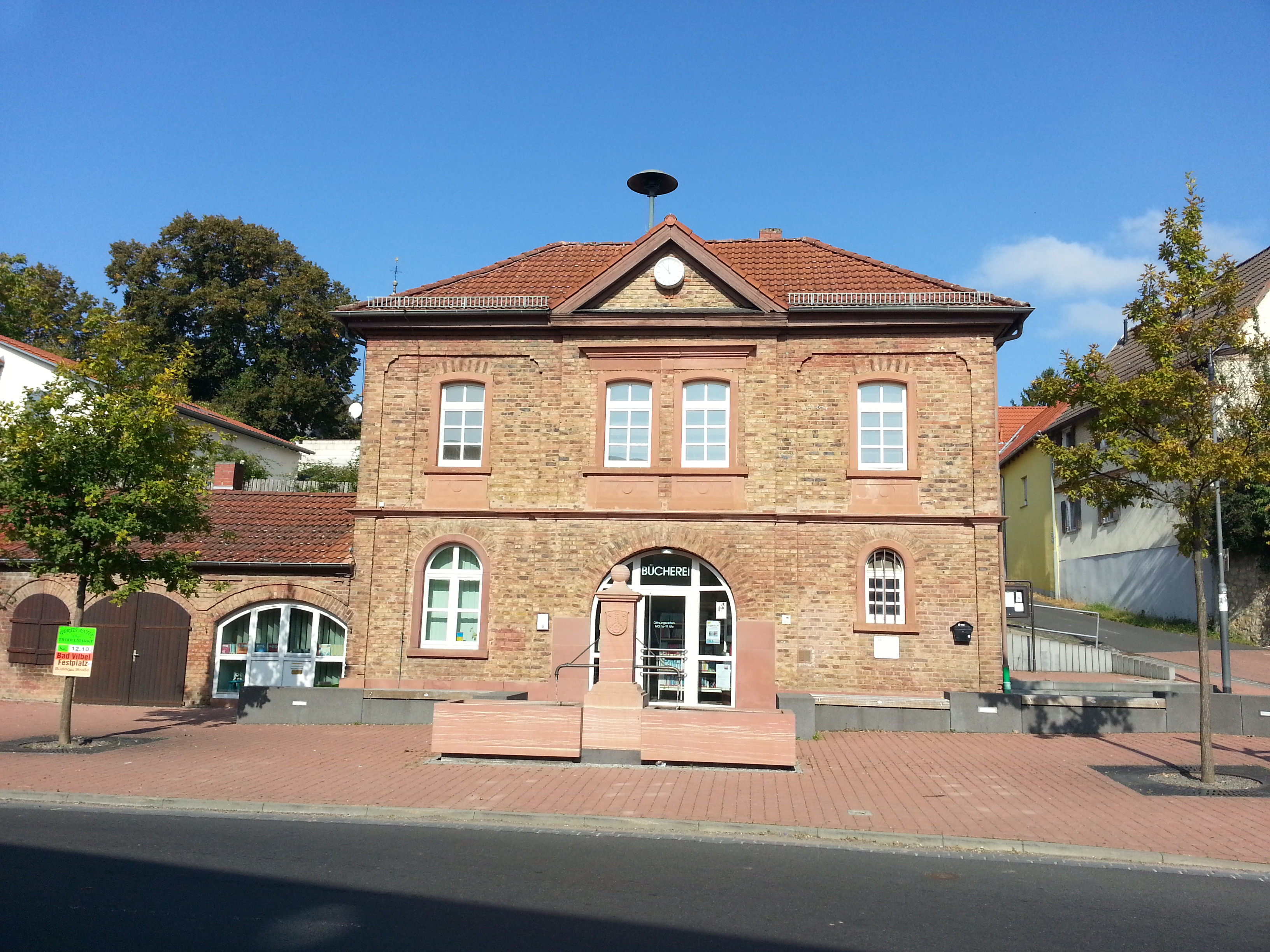 Aufnahme des Rendeler Rathauses